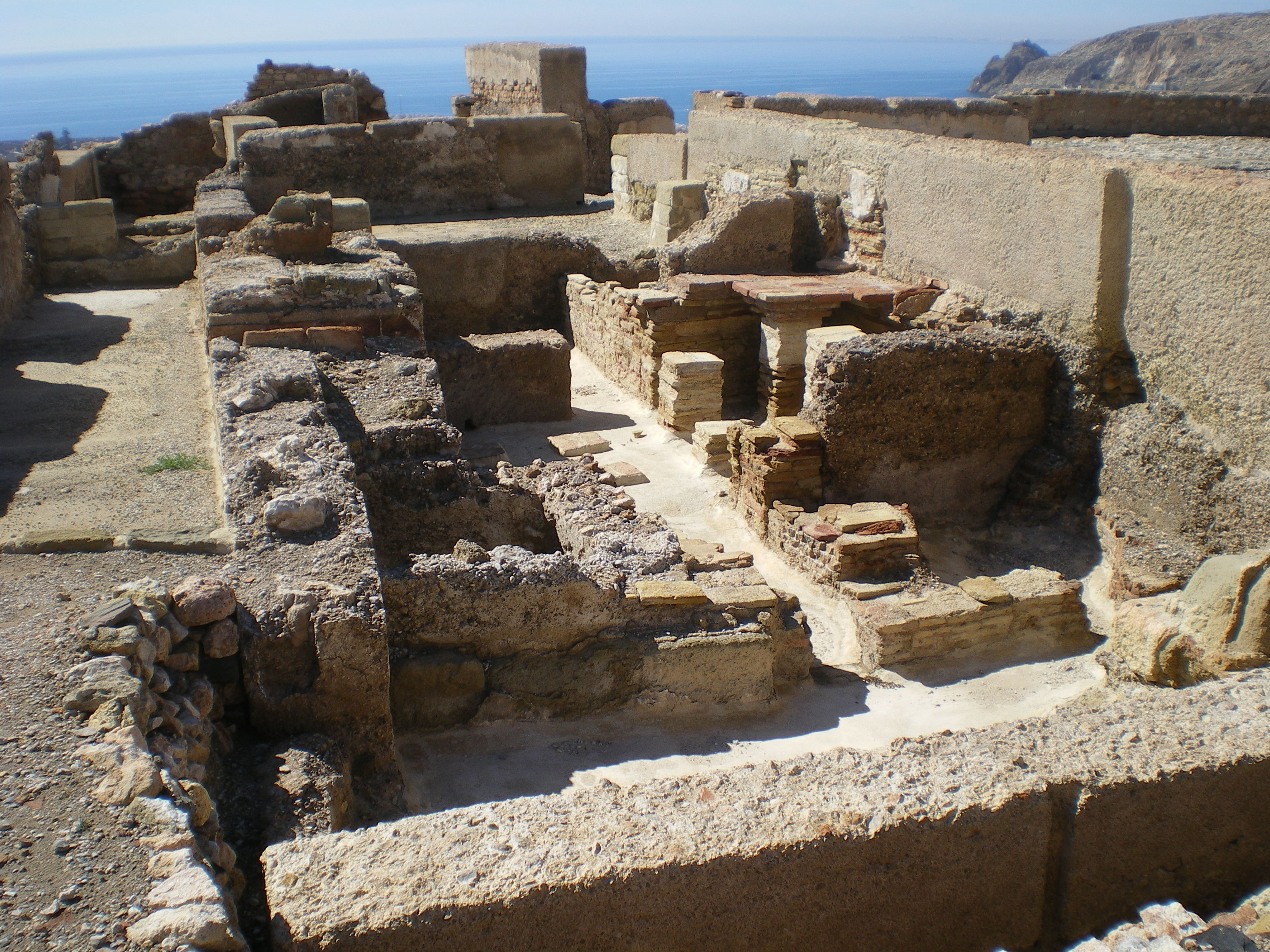 Ruinas de los baños de la reina del Palacio del rey Almotacín, en el segundo recinto de la Alcazaba de Almería, España, desde el norte y el interior de lo que fuera el Palacio.